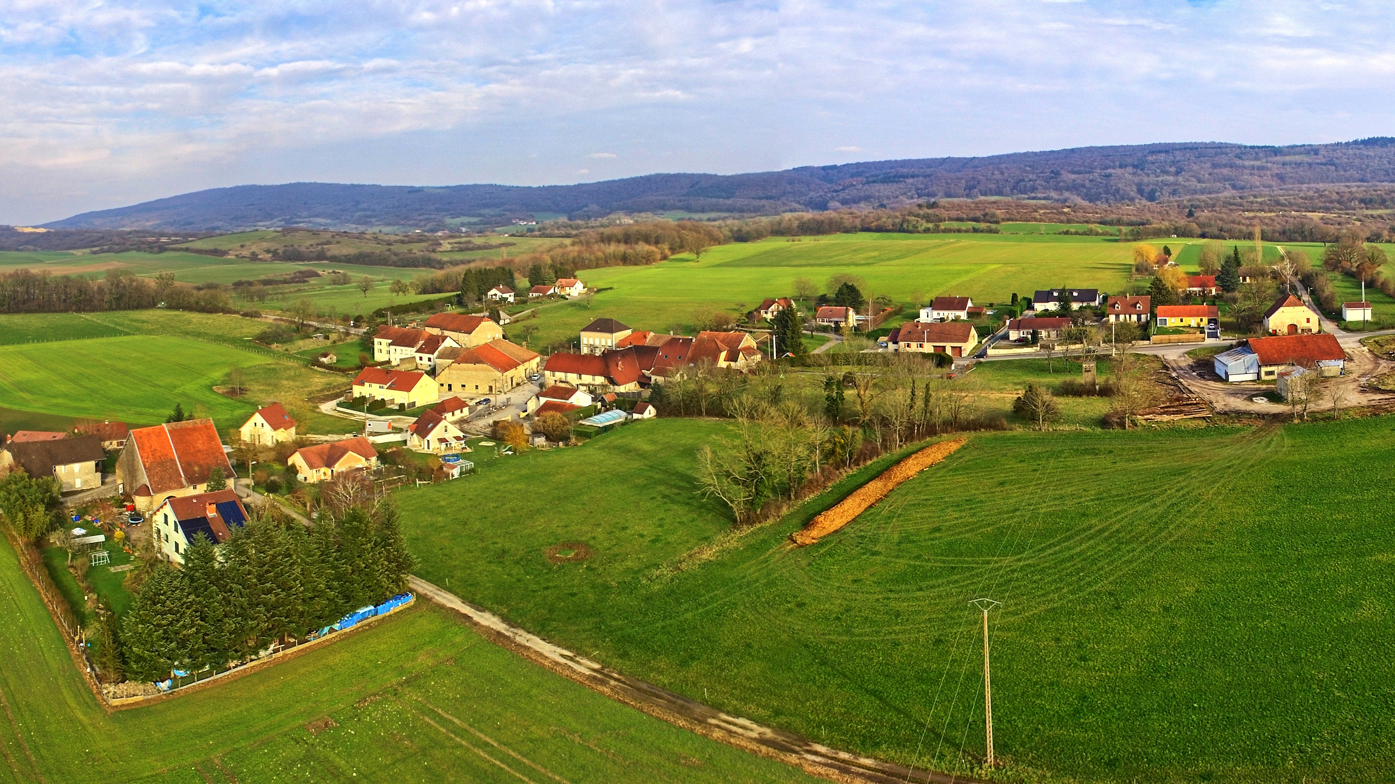 Vue générale du village